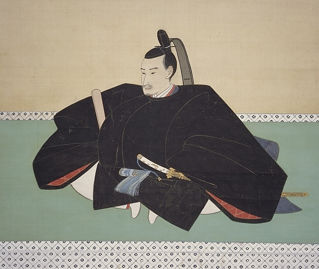 水野忠邦（首都大学東京図書情報センター所蔵水野家文書の一つ）